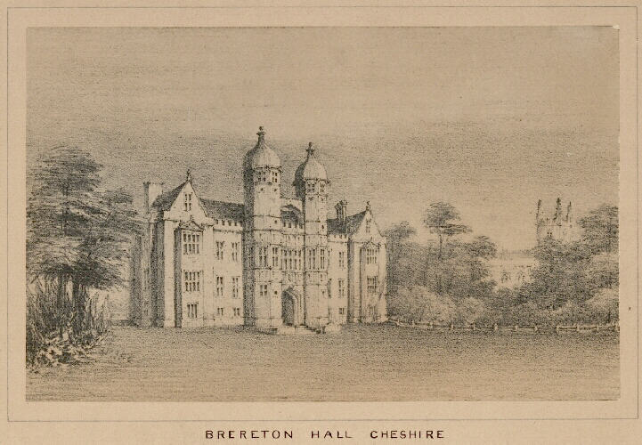 Sketch